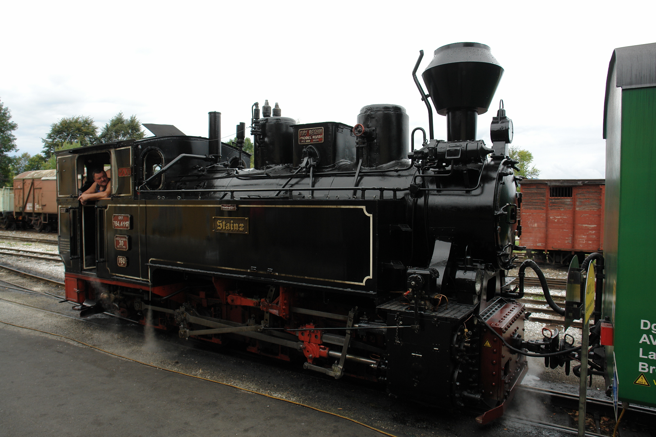 Stainzer Lokalbahn (Stainzer Flascherlzug)